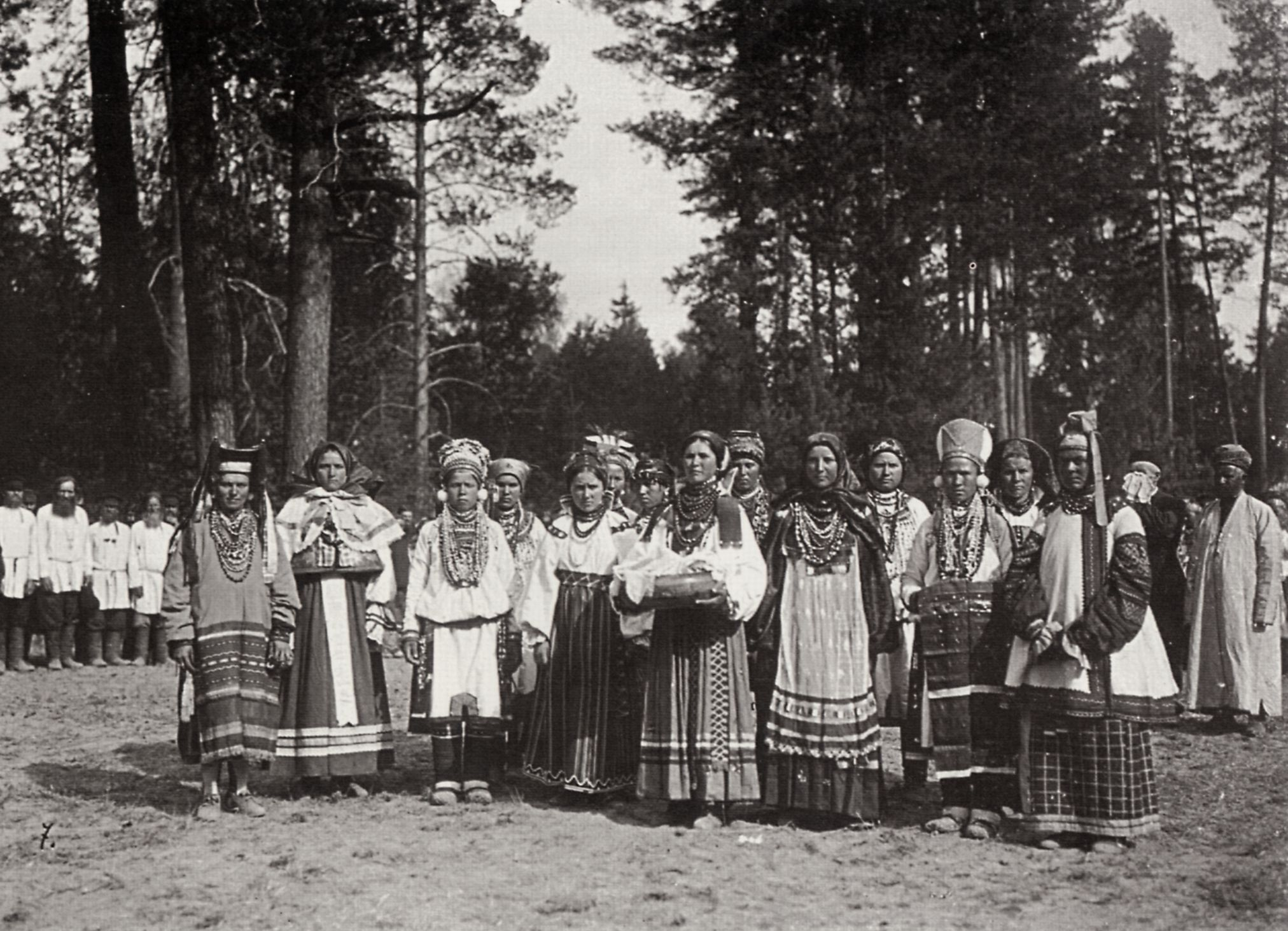 Hahn, K.E.: Frauen in den Volkstrachten des Volgagebietes warten auf die Ankunft des Zaren. Serafim-Sorovski